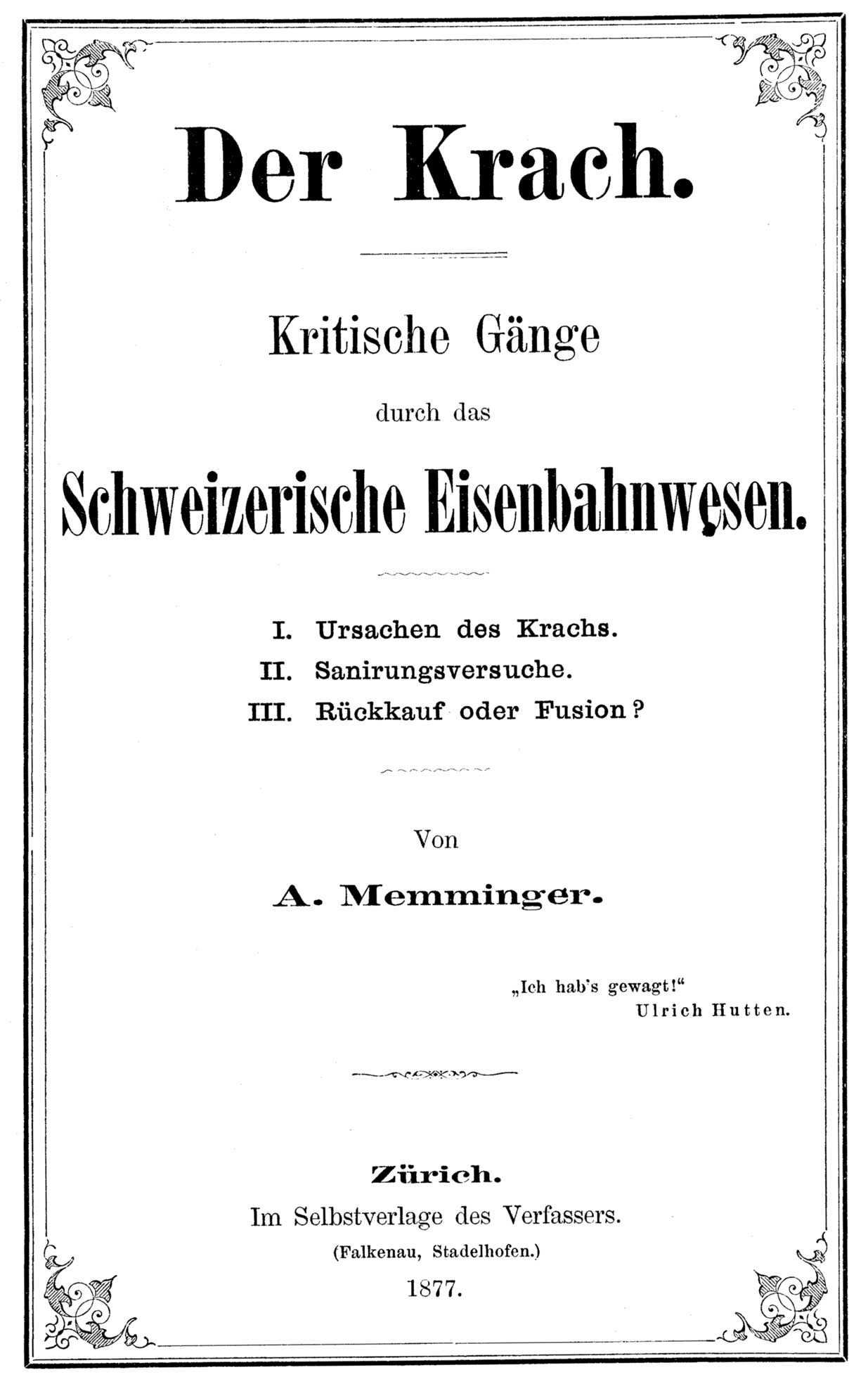 Title page of the book Der Krach – Kritische Gänge durch das Schweizerische Eisenbahnwesen by Anton Memminger